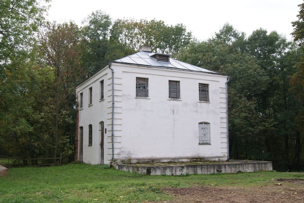 Сядзіба Агінскіх у Залессі пасля рэстаўрацыі